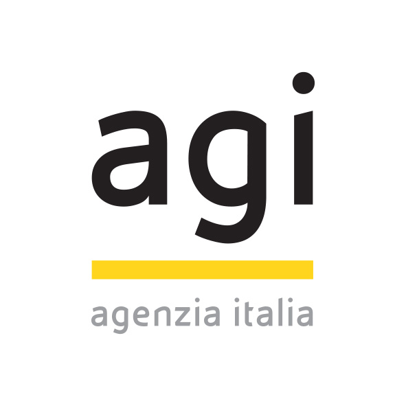 Logo Agi Agenzia Giornalistica Italia